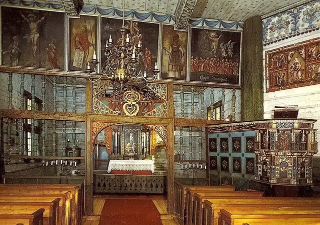 Tresfjord kirke